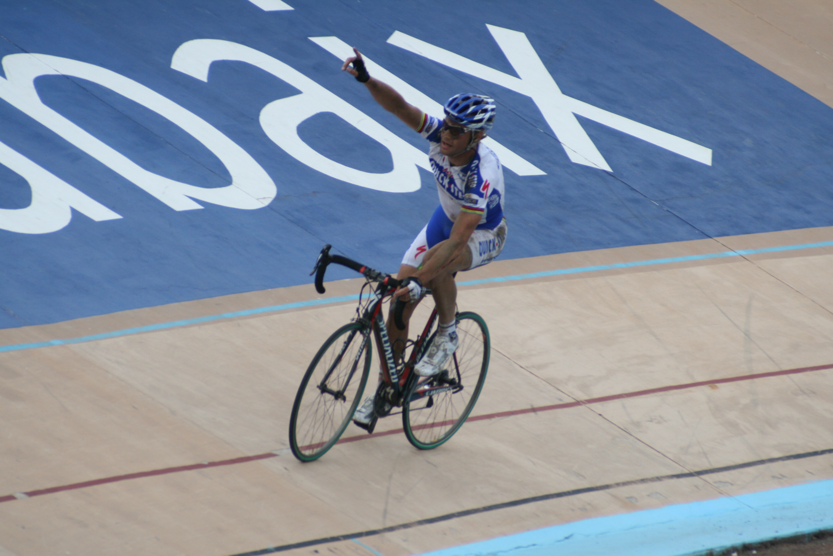 Paris-Roubaix 2009 : Tom Boonen à l'arrivée au vélodrome de Roubaix